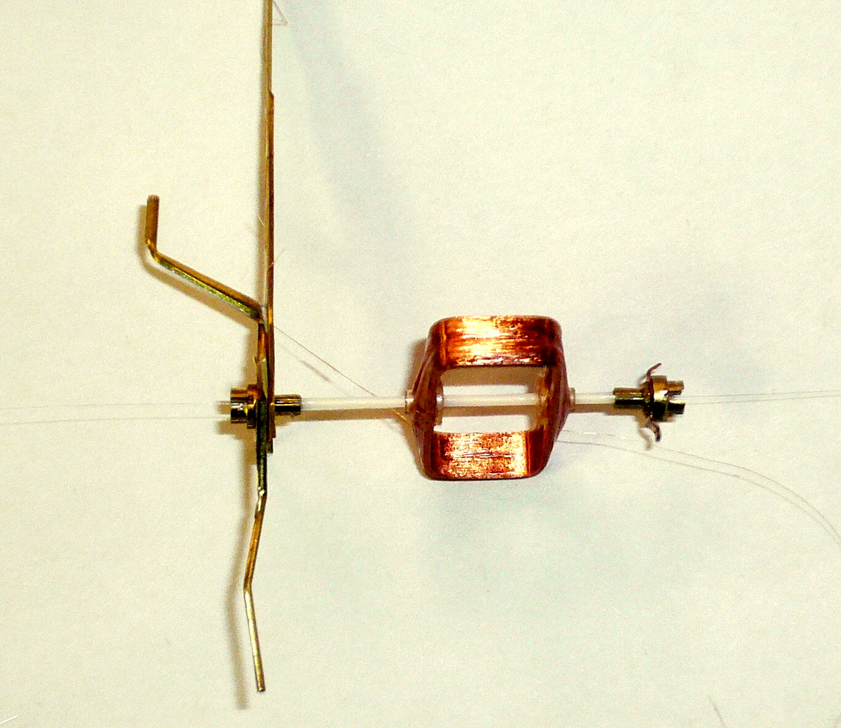 Feszítettszálas, elektrodinamikus műszer lengőtekercse